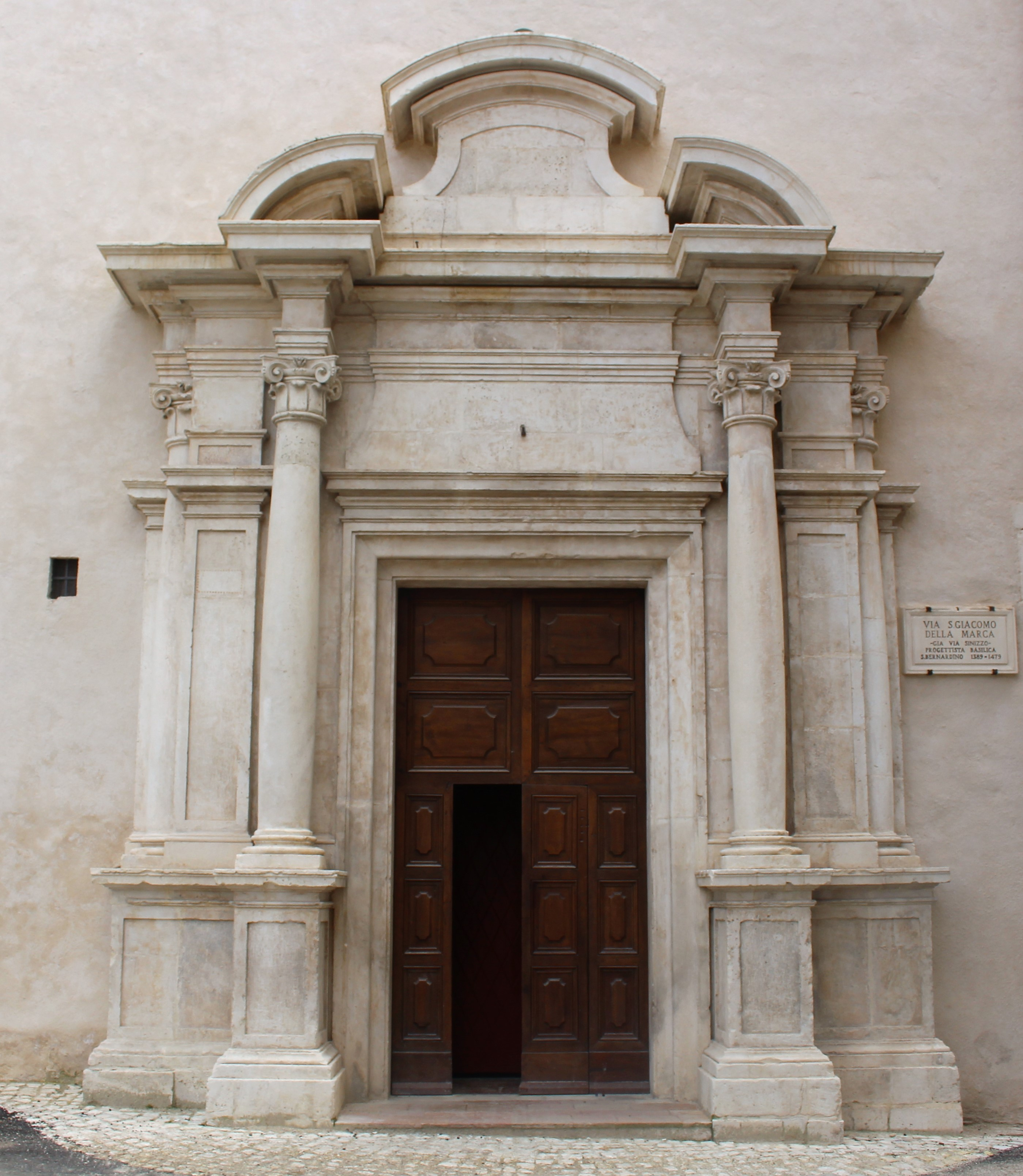 Il portale laterale della basilica di San Bernardino in L'Aquila.